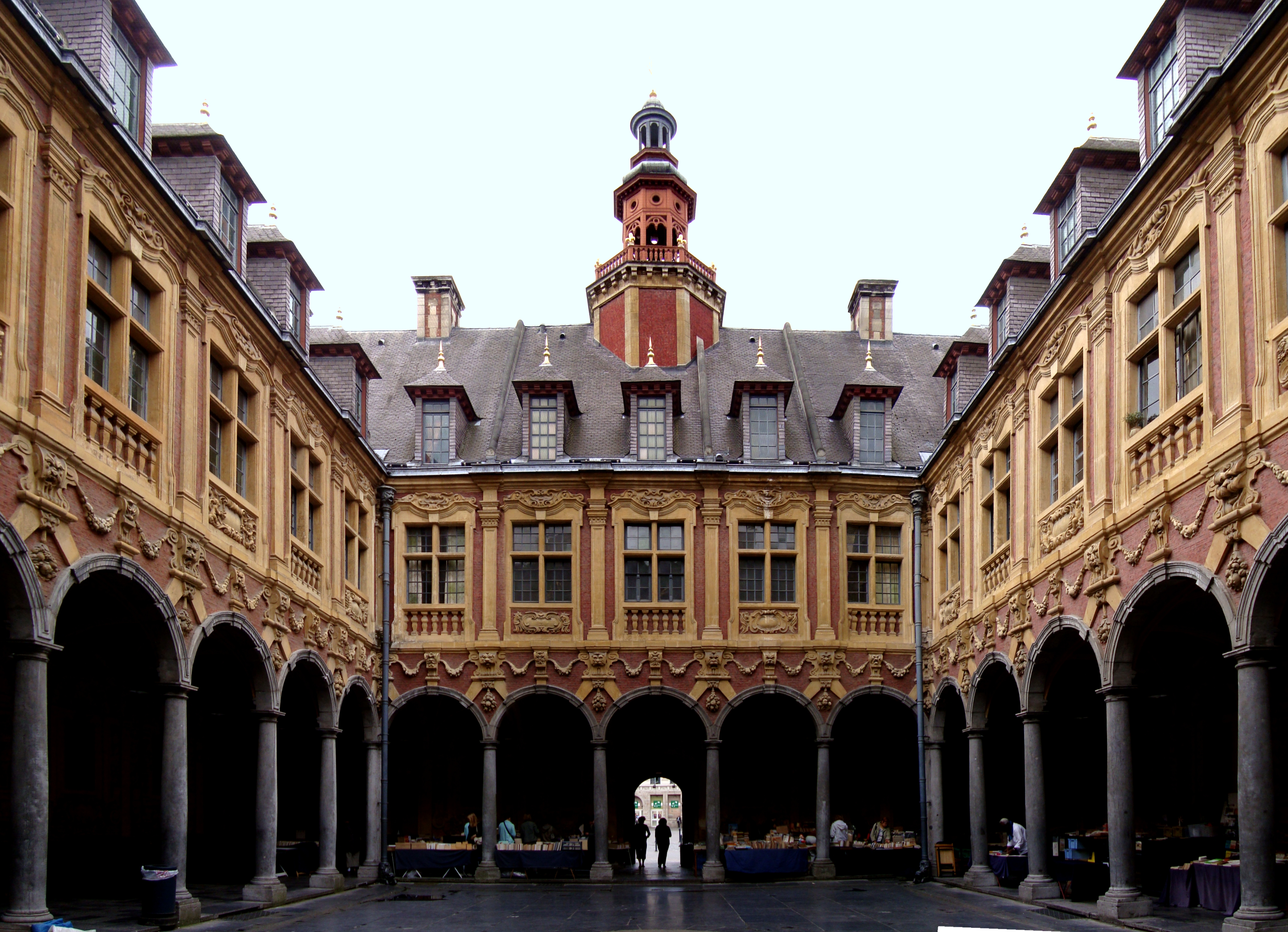 L'intérieur de la Vieille Bourse de Lille (Nord).